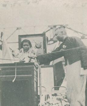 题名： 国内时事:上:首都铁路轮渡通车典礼.杨秀琼剪彩绳时摄影:[照片] 作者： 中华 攝 文献来源： 《中华月报》 出版时间： 1933 年 卷期(页)： [ 第1卷 第10期 ，1页 ]